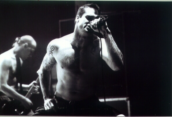 Henry Rollins durante un concierto de Rollins Band.